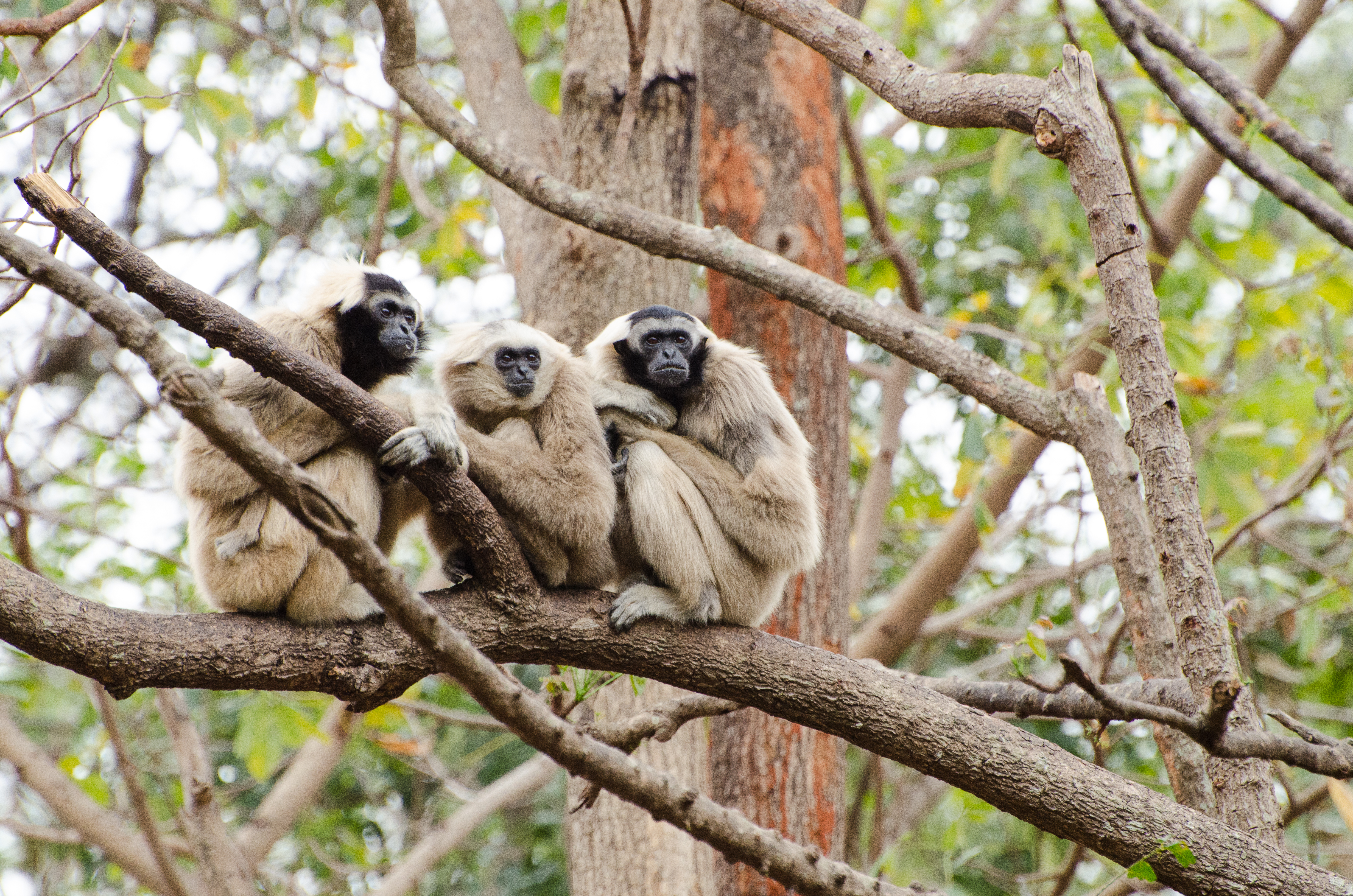 3 Crowned Gibbon